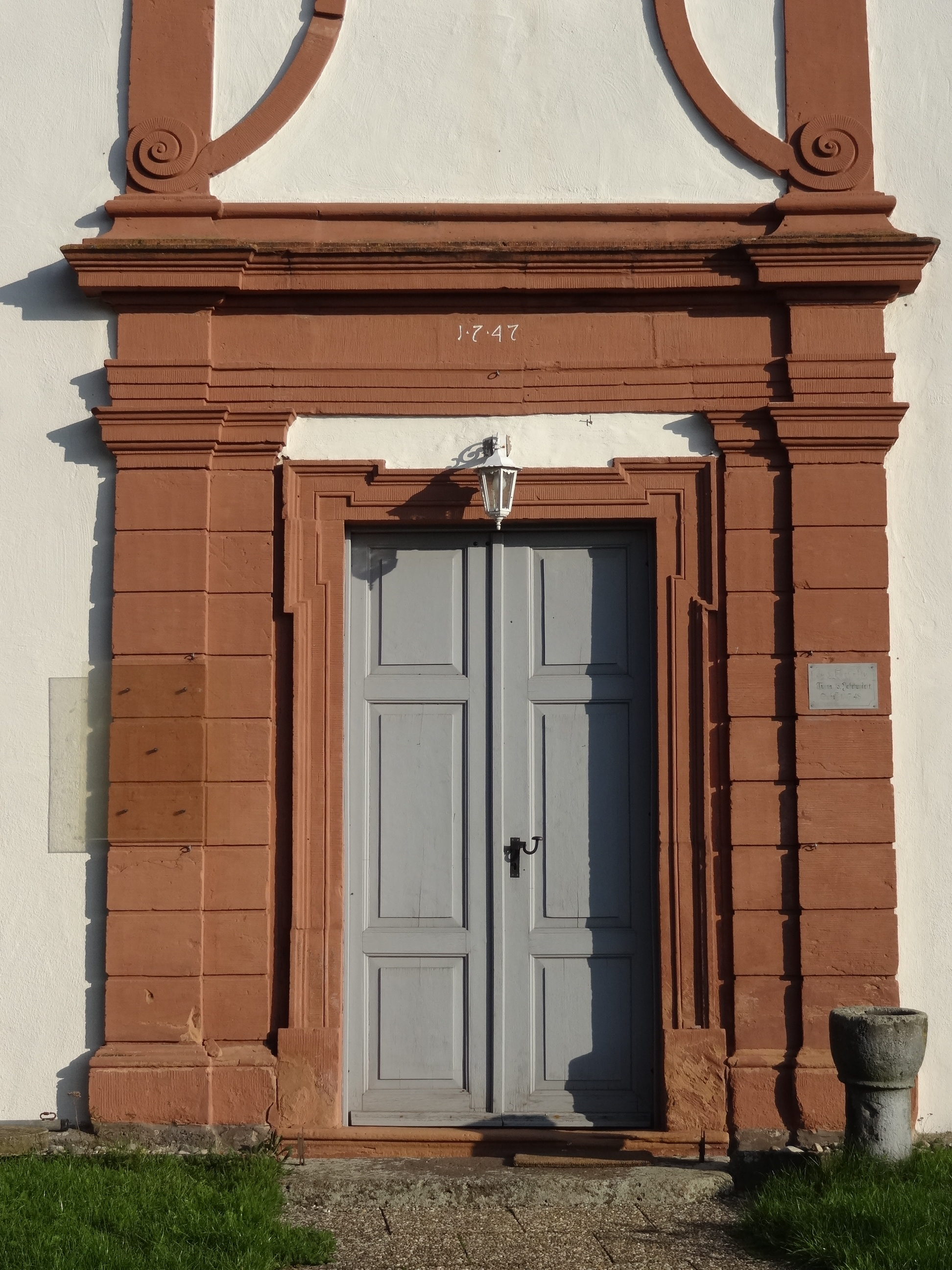 Evangelische Kirche Bettenhausen (Lich)